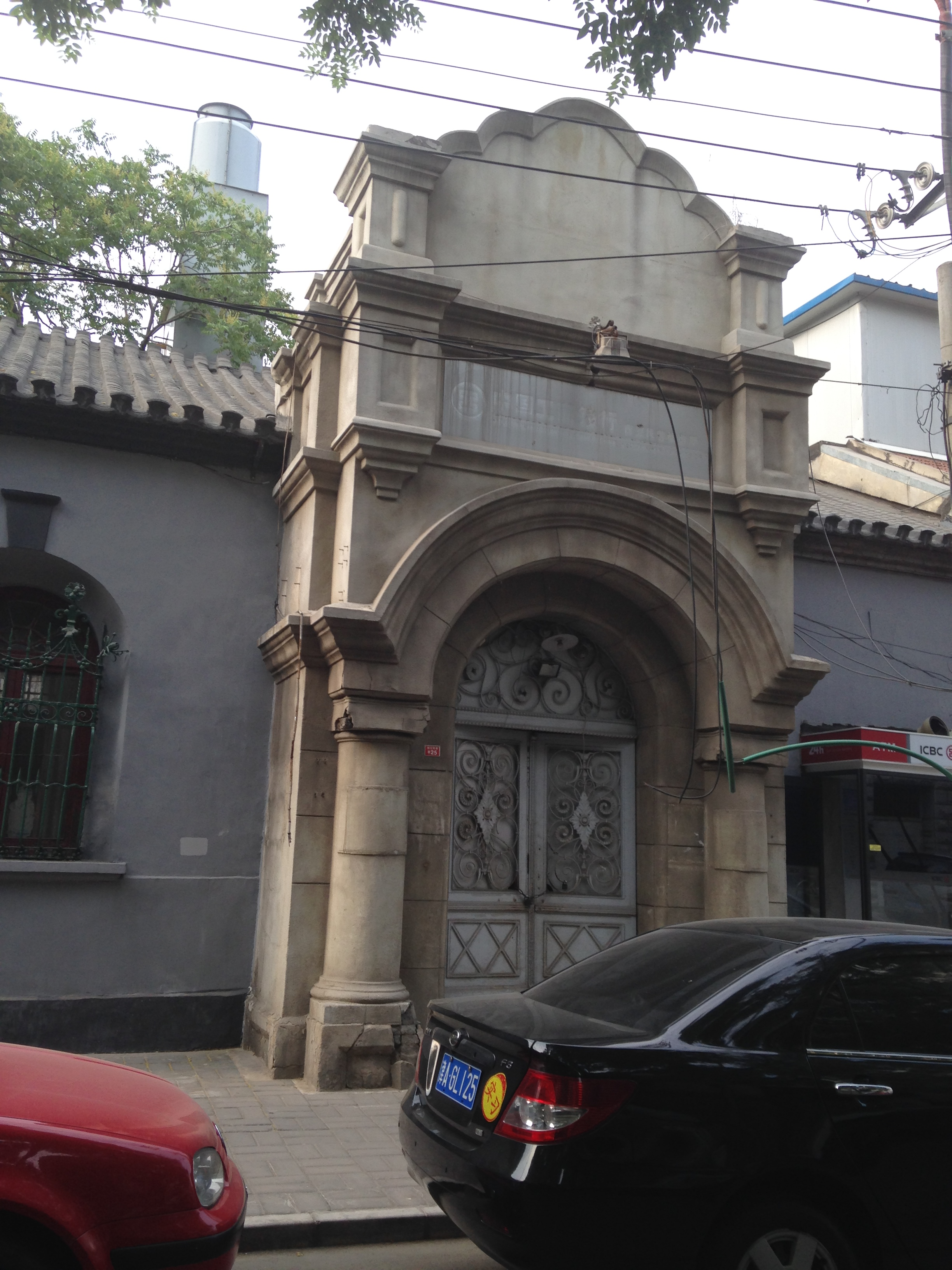 中文（中国大陆）: 大清户部银行旧址